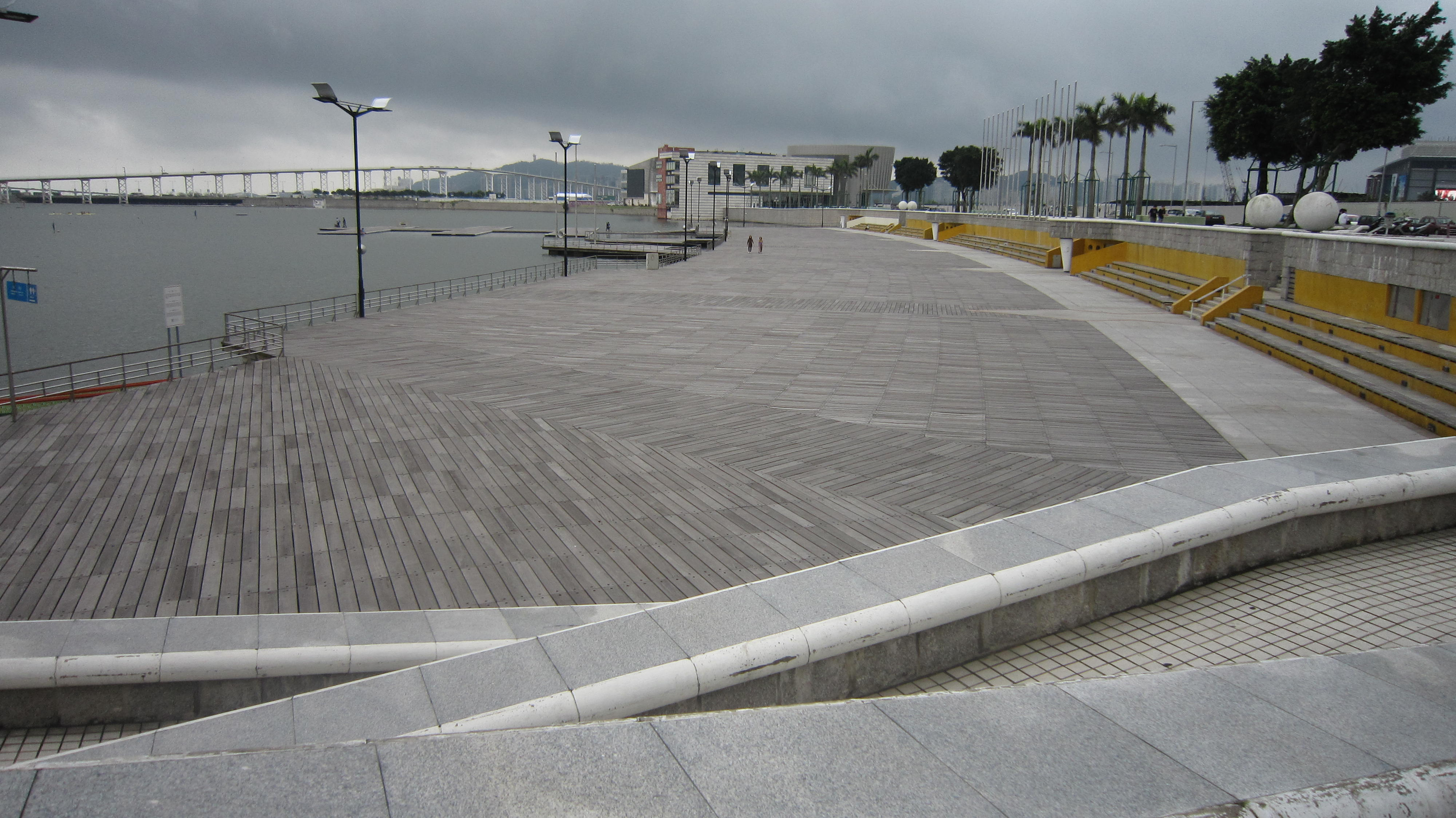 Tijolos de borracha no Centro Náutico da Praia Grande